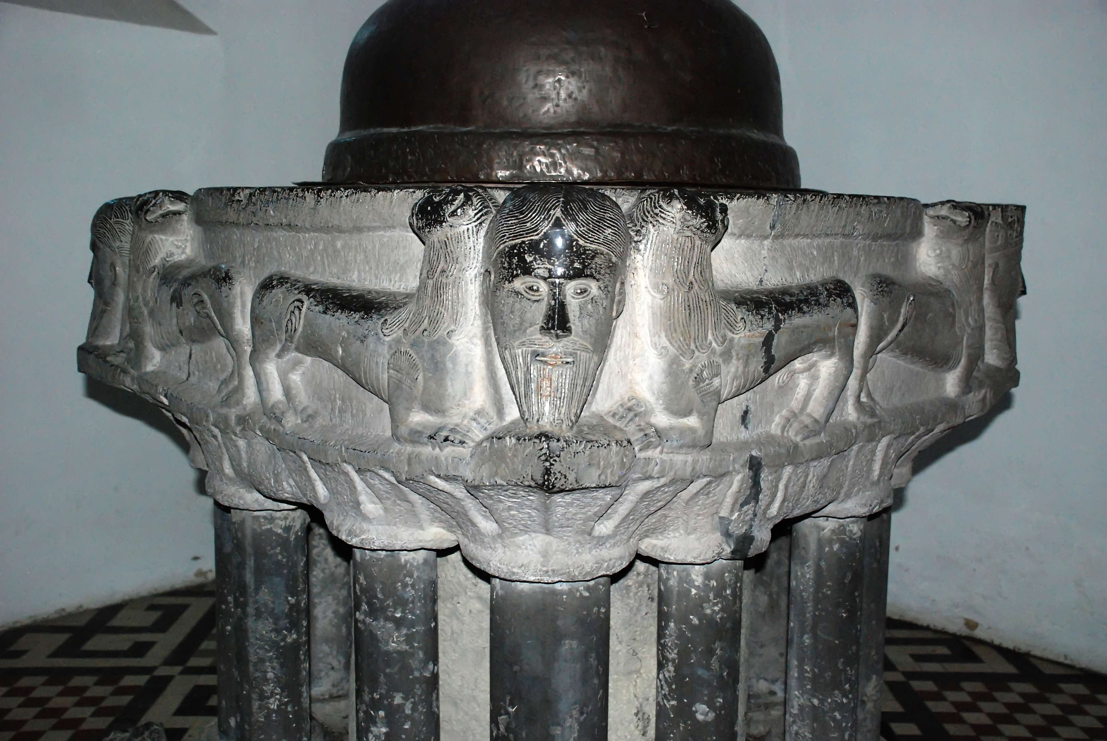 Belgique - Wallonie - Fonts baptismaux de Saint-Séverin-en-Condroz